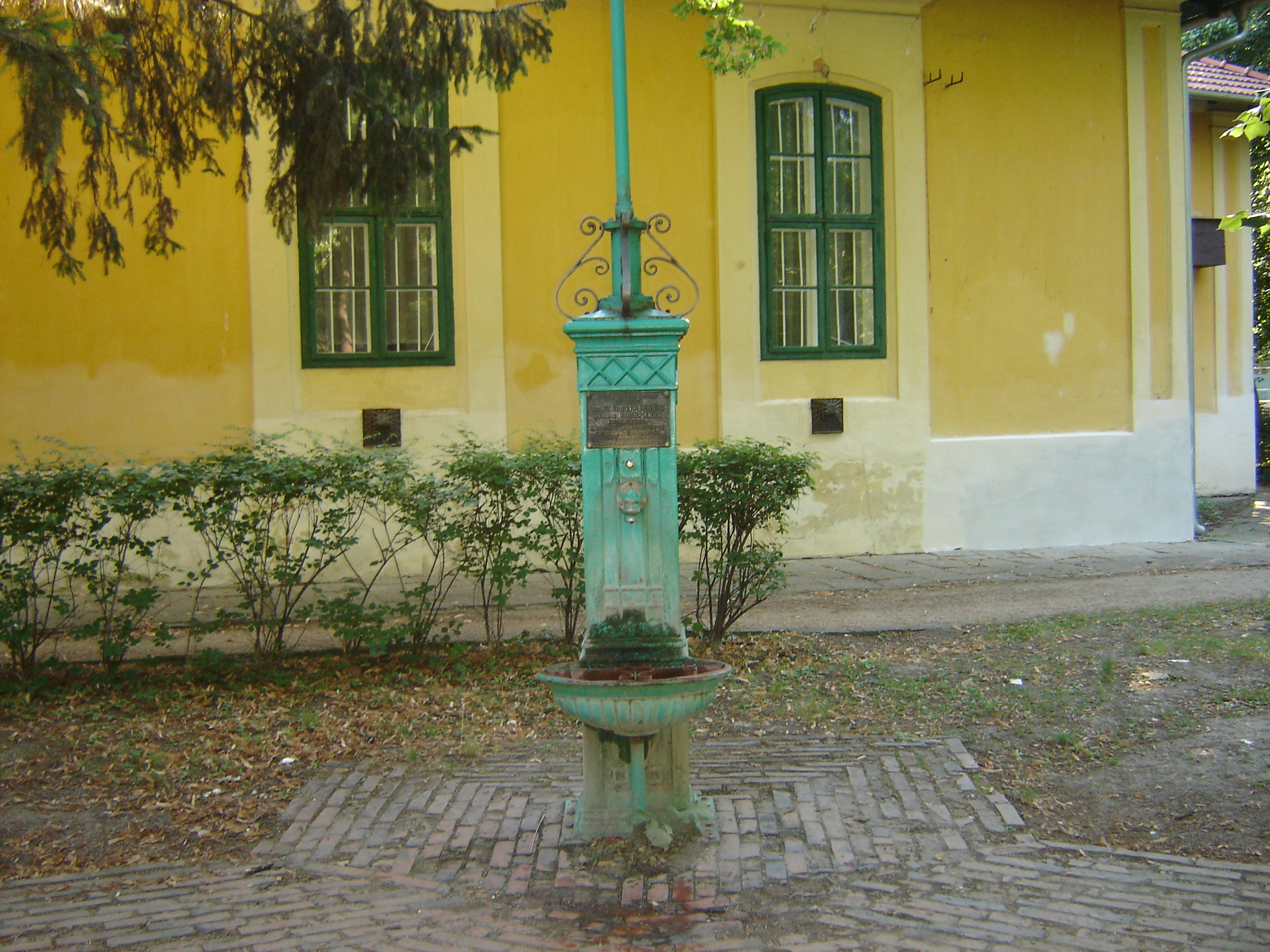 Zsoldos kút a Koszta József Múzeum keleti rizalitja előtt Pataki Márta felvétele